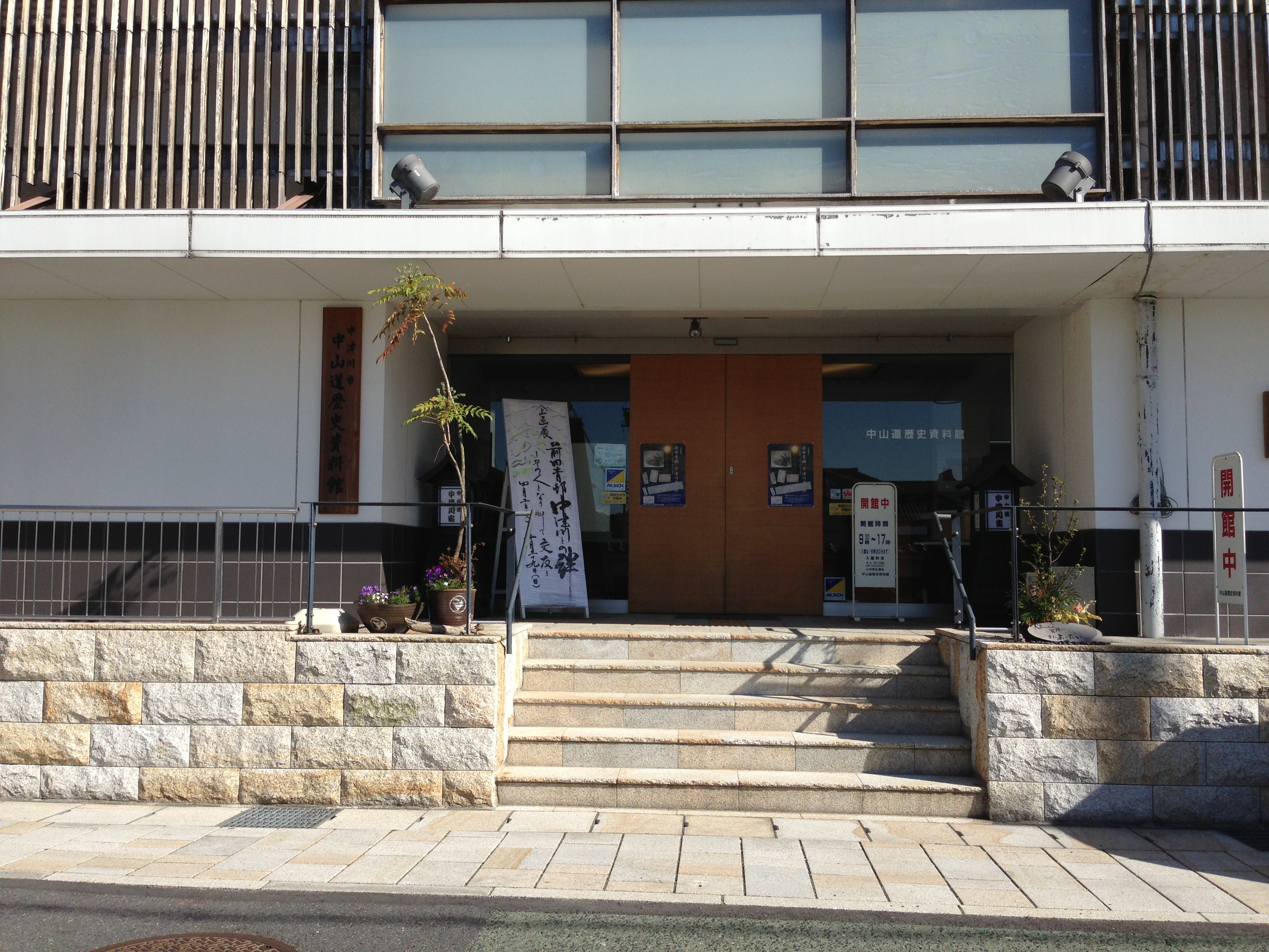 中津川市中山道歴史資料館